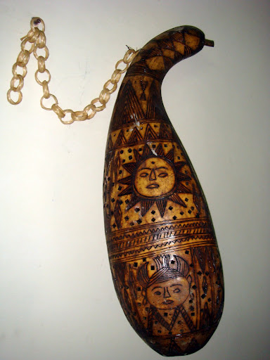 तुम्बा शिल्प बस्तर, छत्तीसगढ़ की जनजातियों के द्वारा लौकी पर गर्म लोहे के चाकू से किये गये पारंपरिक चित्रांकन को तुम्बा शिल्प कहते है।